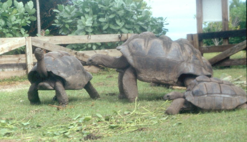 Bildbeschreibung: Seychellen Riesenschildkröte (Dipsochelys hololissa) Quelle: Mit freundlicher Genehmigung von Dr. Justin Gerlach (Scientific Co-ordinator - Nature Protection Trust of Seychelles)